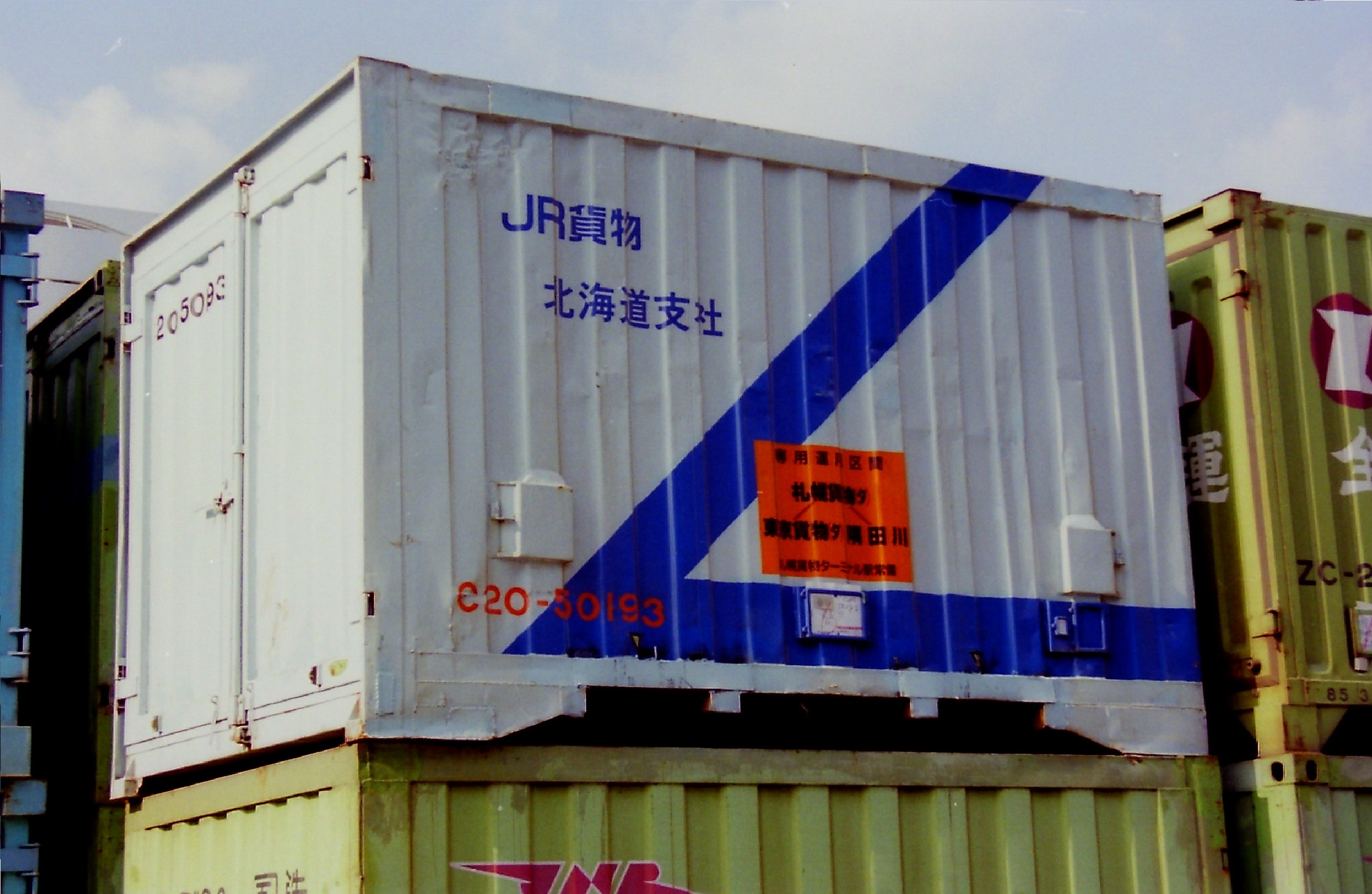 撮影地＝【大阪／元、梅田貨物駅】